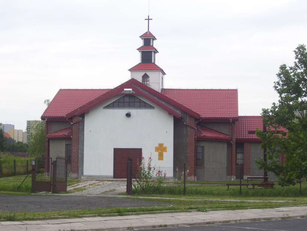 kościół parafialny parafii Wniebowstąpienia Pańskiego. kościół pw. Wniebowstąpienia Pańskiego na osiedlu Pienista.